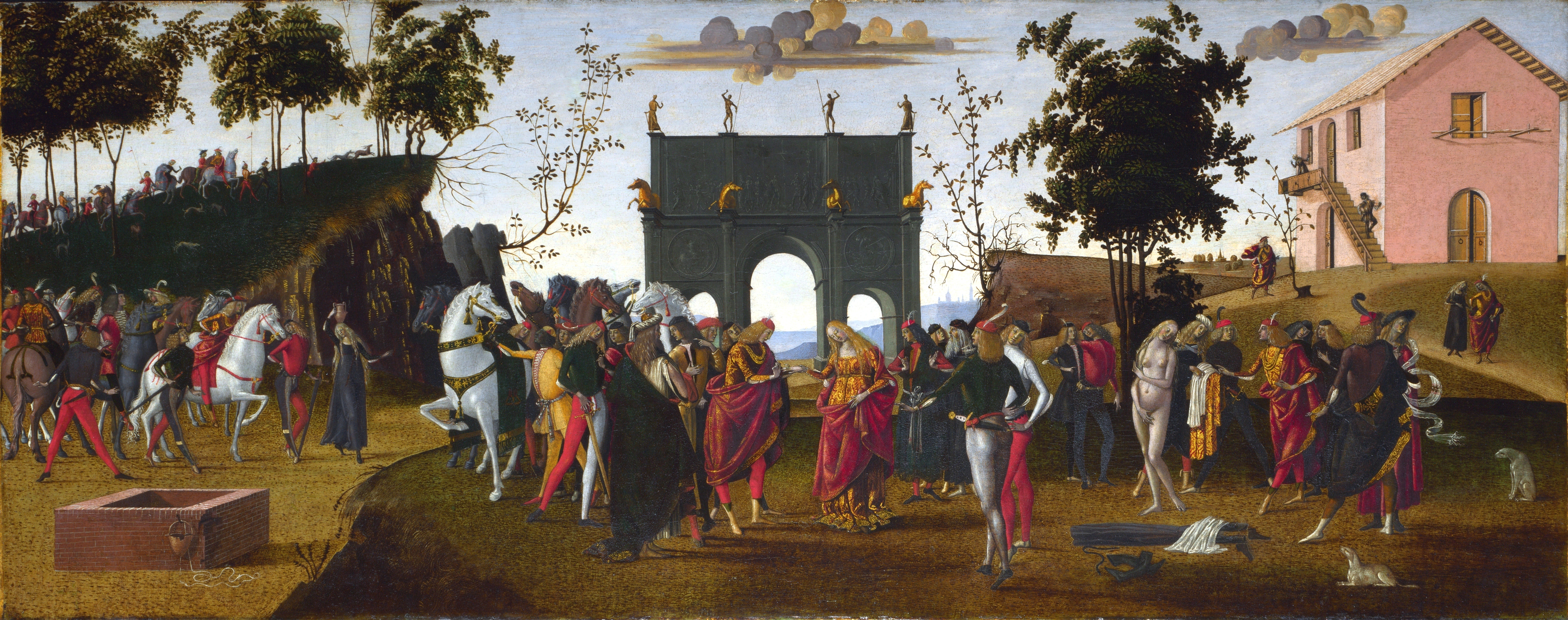 Мастер истории Гризельды. История Гризельды. Брак. Ок. 1490-х. Лондон, Национальная галерея